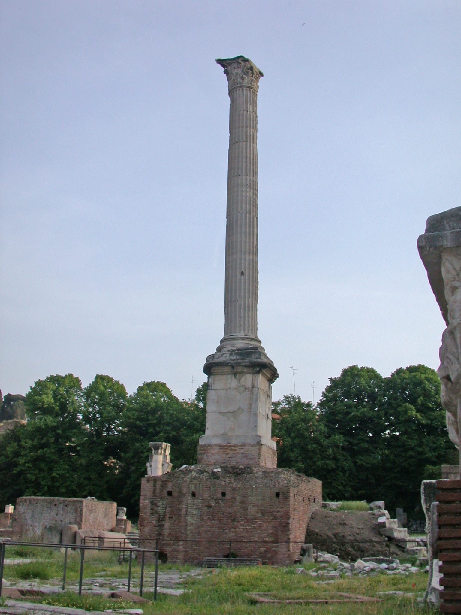 Roma, Foro Romano, Colonna di Foca. Foto personale (maggio 2005) by MM in it.wiki